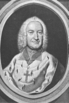 Leopold Ernst Graf von Firmian, Bischof von Passau 1763-1783